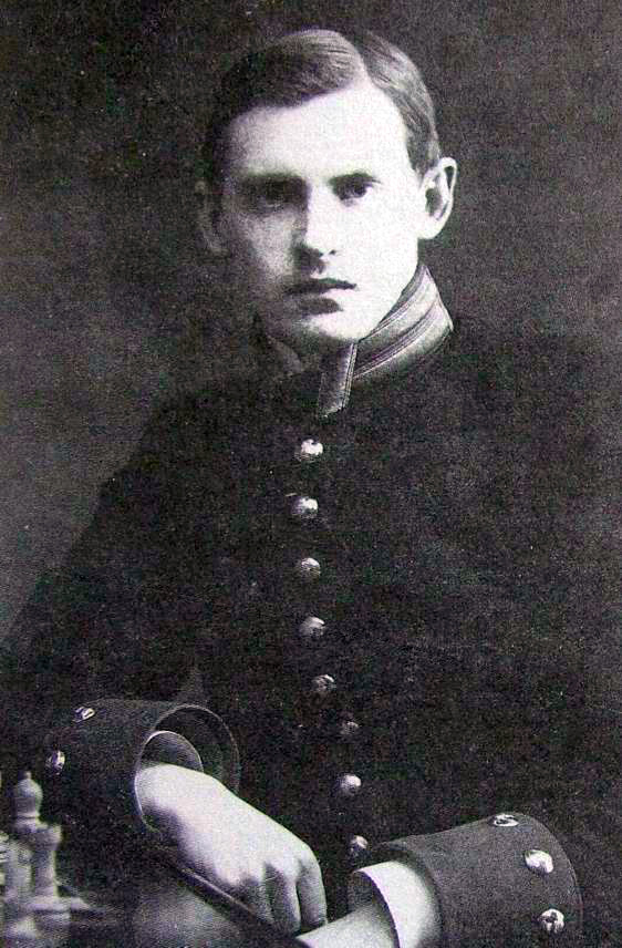 Молодой шахматист Алехин, будущий чемпион Москвы и чемпион мира.